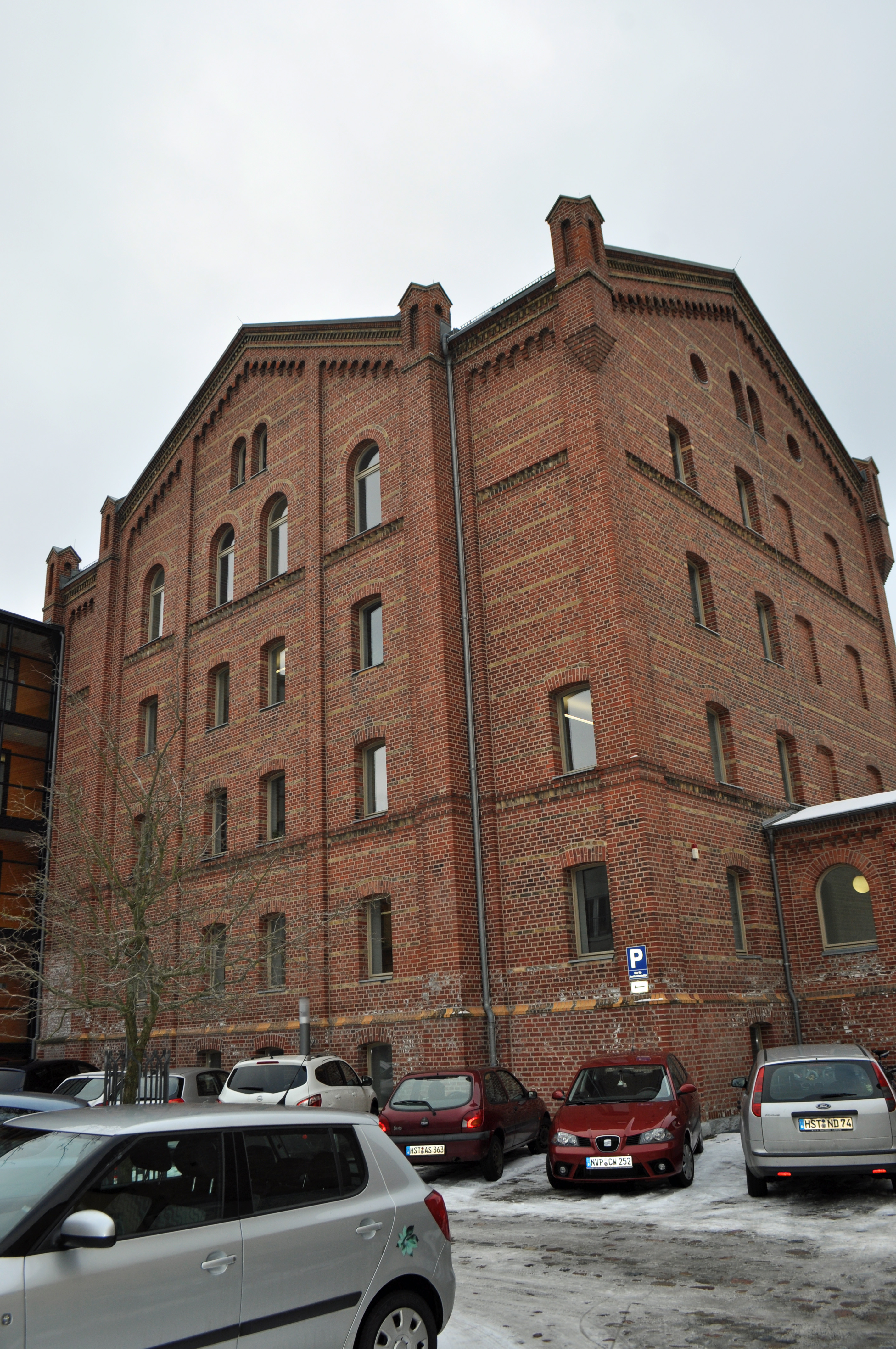 Stralsund, Bielkenhagen (2013-02-13), by Klugschnacker in Wikipedia (2) This is a photograph of an architectural monument.